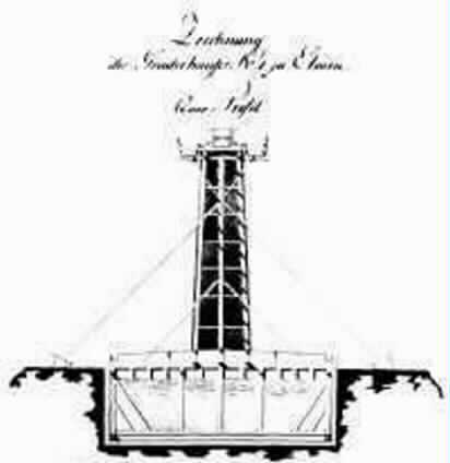 Querschnitt durch ein Gradierwerk mit Sole-Auffangbecken, Konstruktionszeichnung 18.Jhdt.